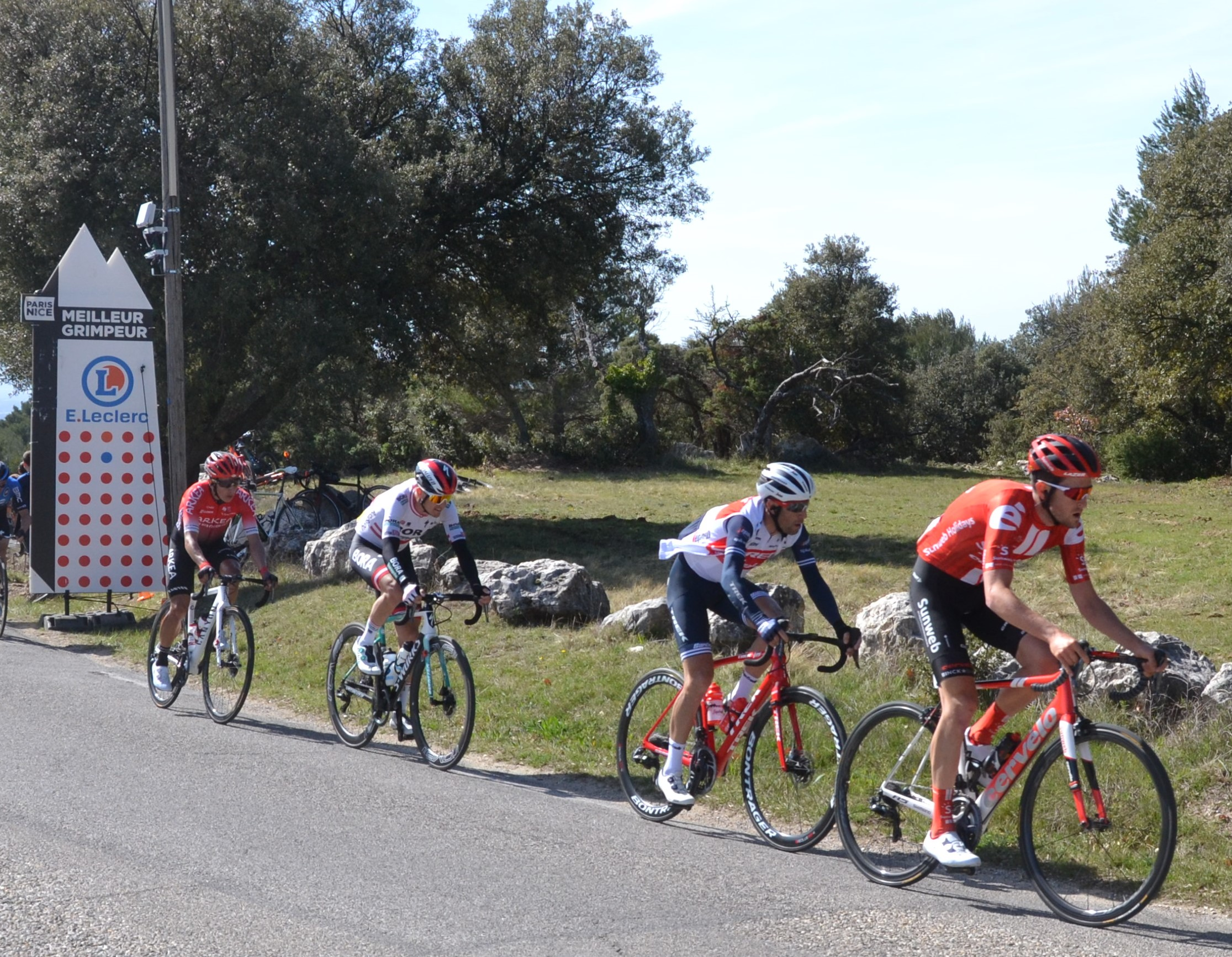 lors de la 6ème étape du Paris Nice 2020